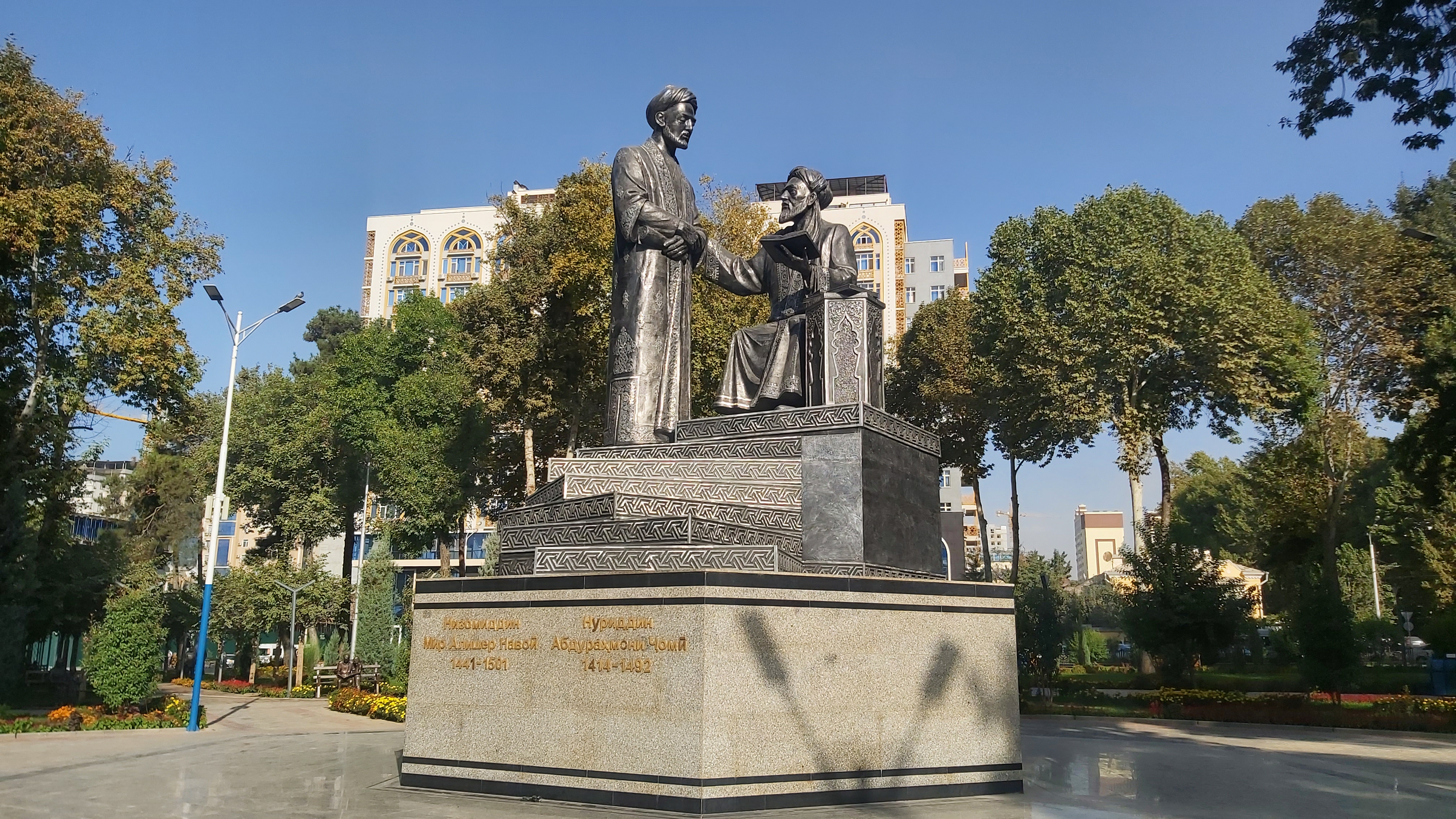 Навои и Джами